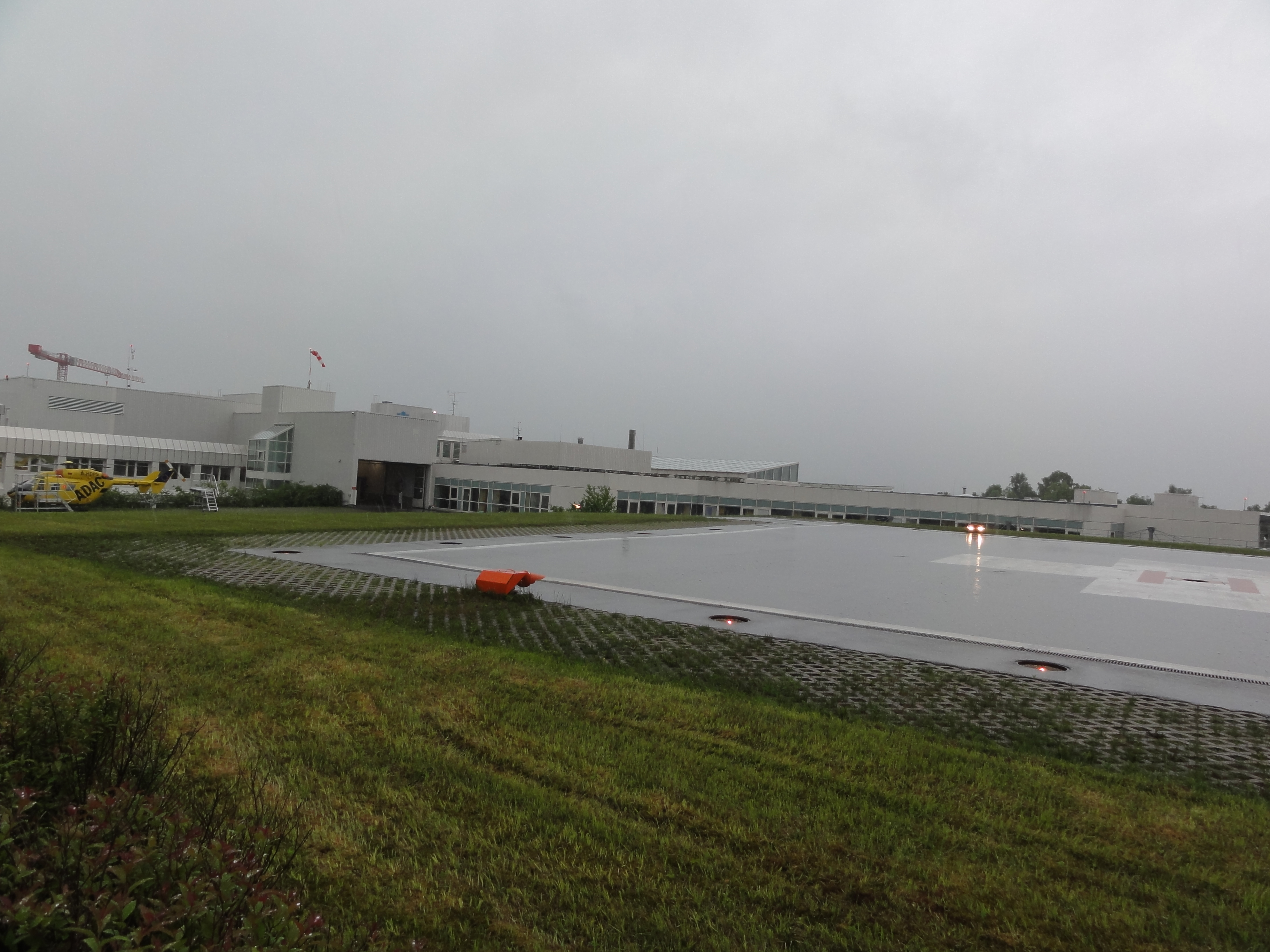 Murnau am Staffelsee, Germany